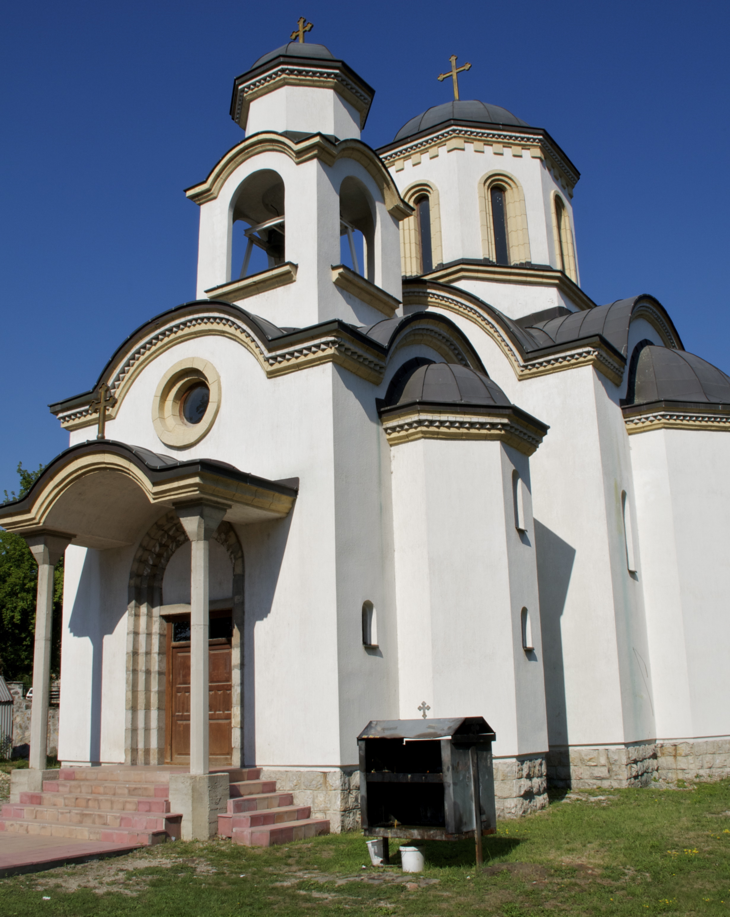 Црква Св. Пантелејмона у Ресавици